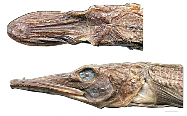 Head of Unicorn icefish Channichthys rhinoceratus Richardson, 1844, dorsal and lateral views, specimen 315 mm SL, Kerguelen Is, Antarctica